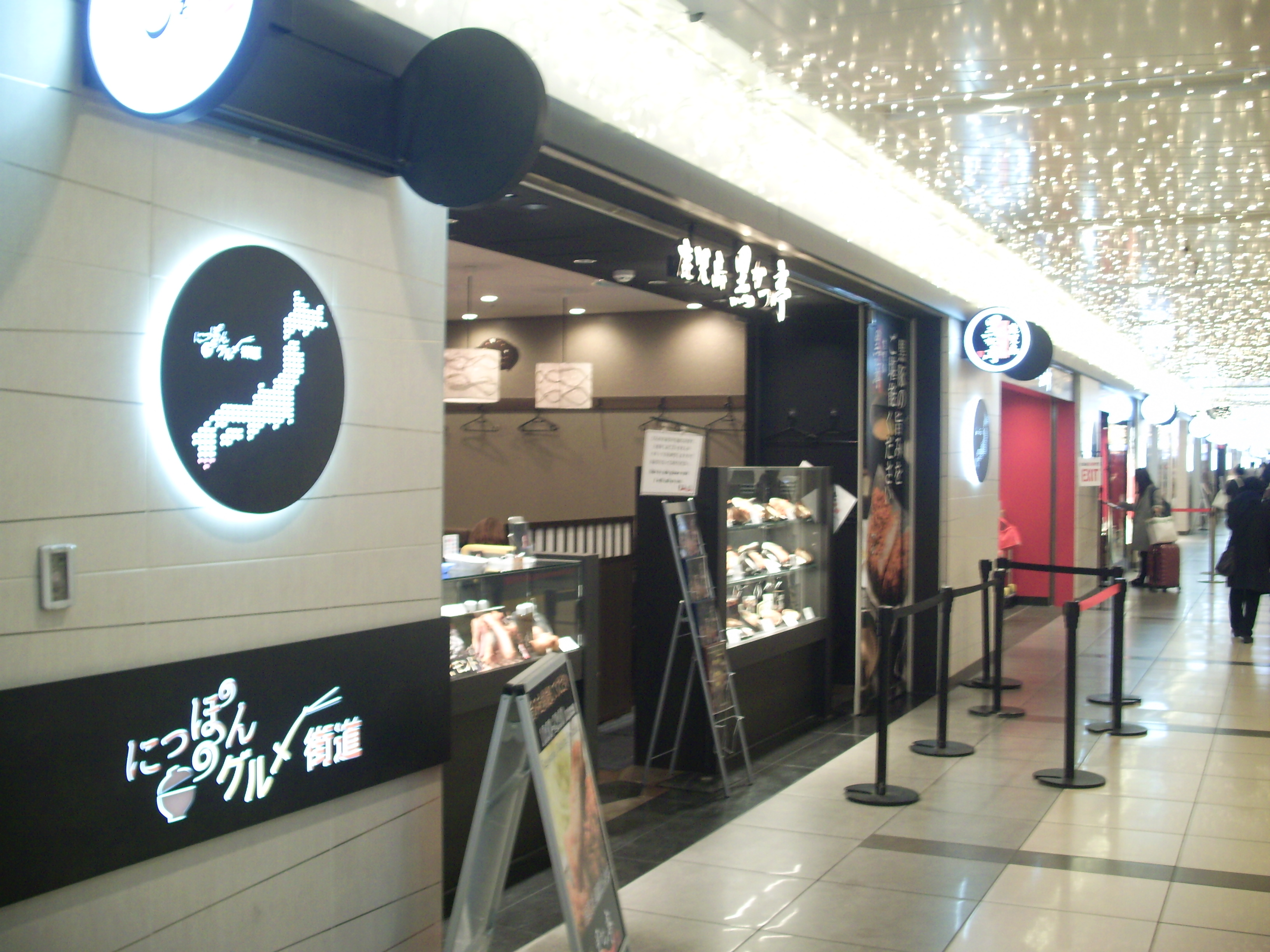 東京駅八重洲口側でJR東海系の東京ステーション開発㈱が運営する東京駅一番街のにっぽんグルメ街道 ㊟カメラを起動すると日付機能が出荷時のものに初期化されるため、ファイル履歴の撮影・投稿日時とメタデータの原画像データの生成日時が異なります